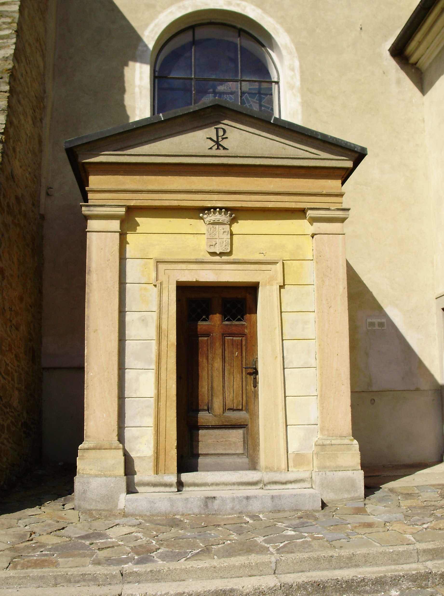 Hrobka rodu Mundy v kostele v Drnovicích (Vyškov District, Czech Republic)